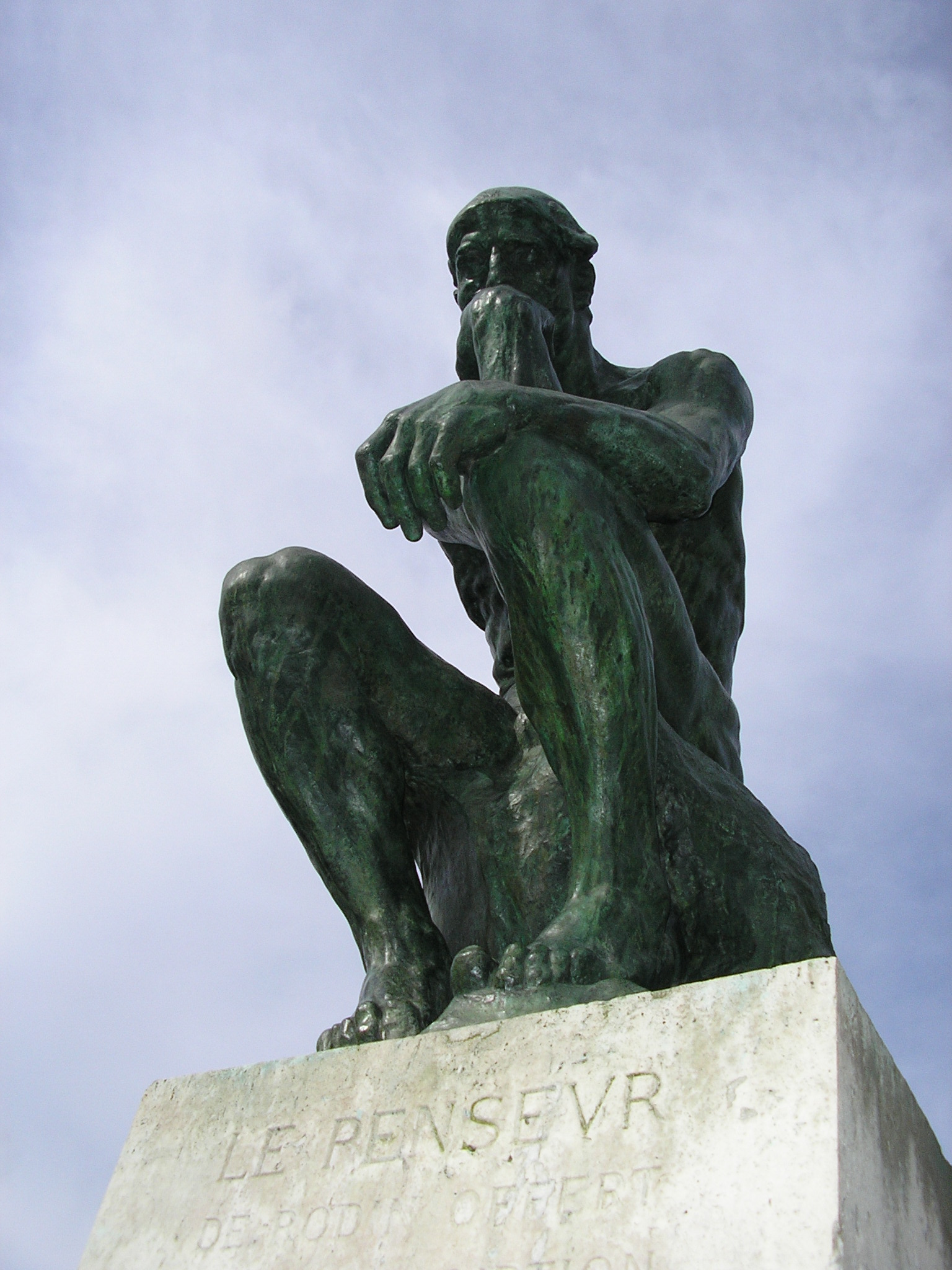 El pensador de Rodin, foto de Adrían Arellano (Zahualli)